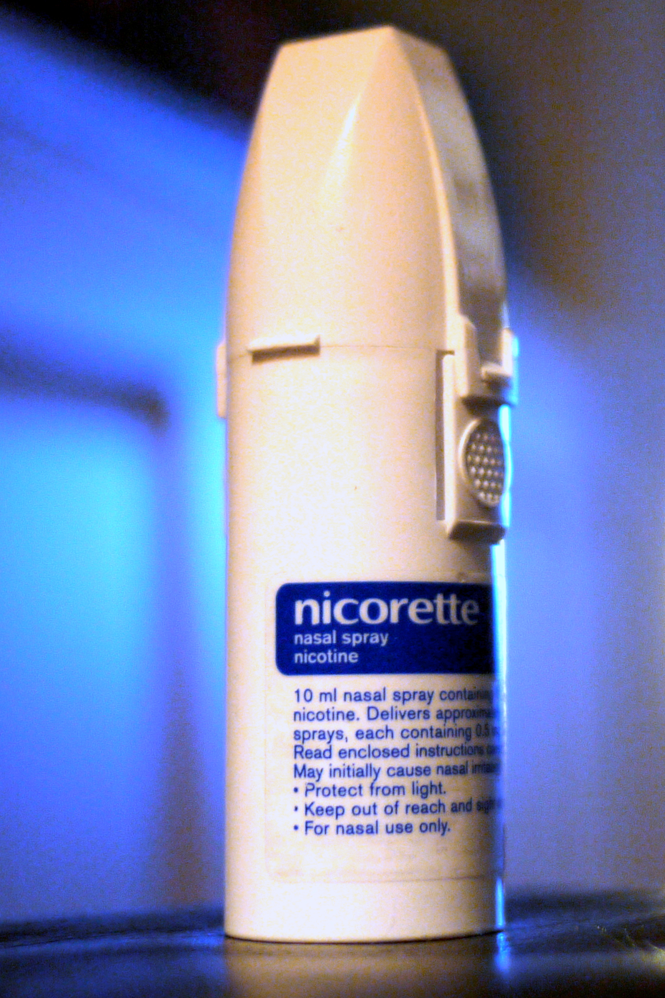 Nicorette Nasal (Nose) Spray